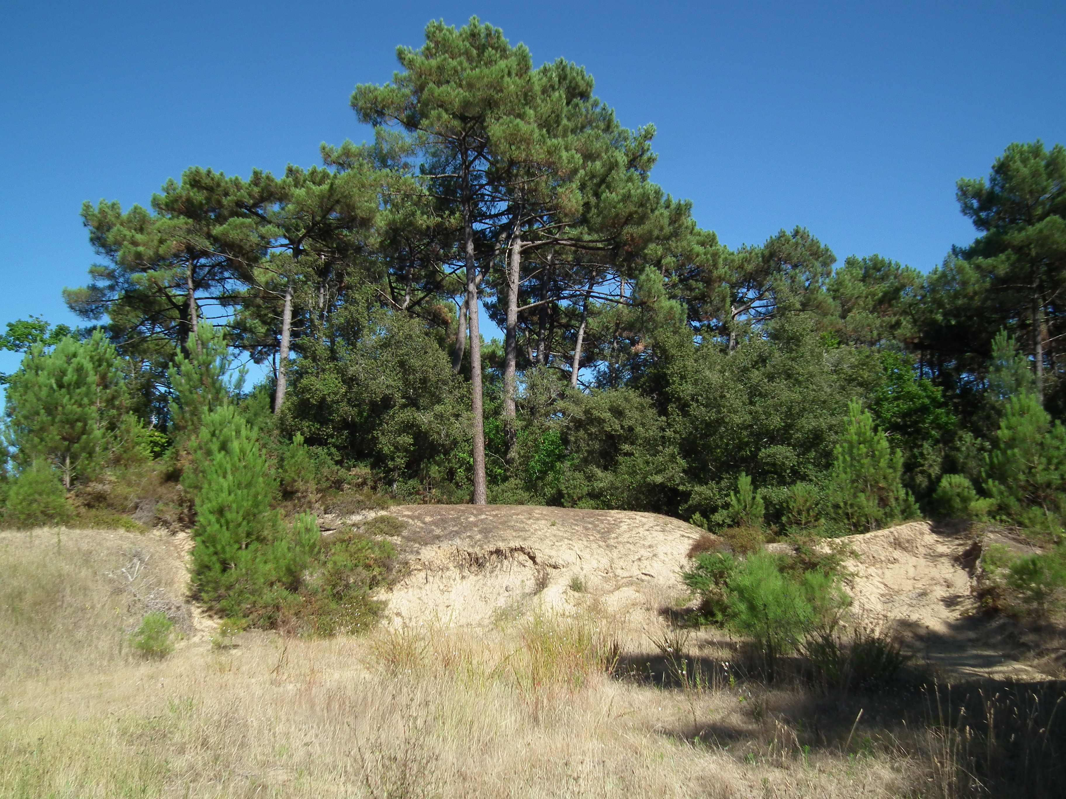 Clairière et dunes dans la forêt des Combots, Saint-Augustin